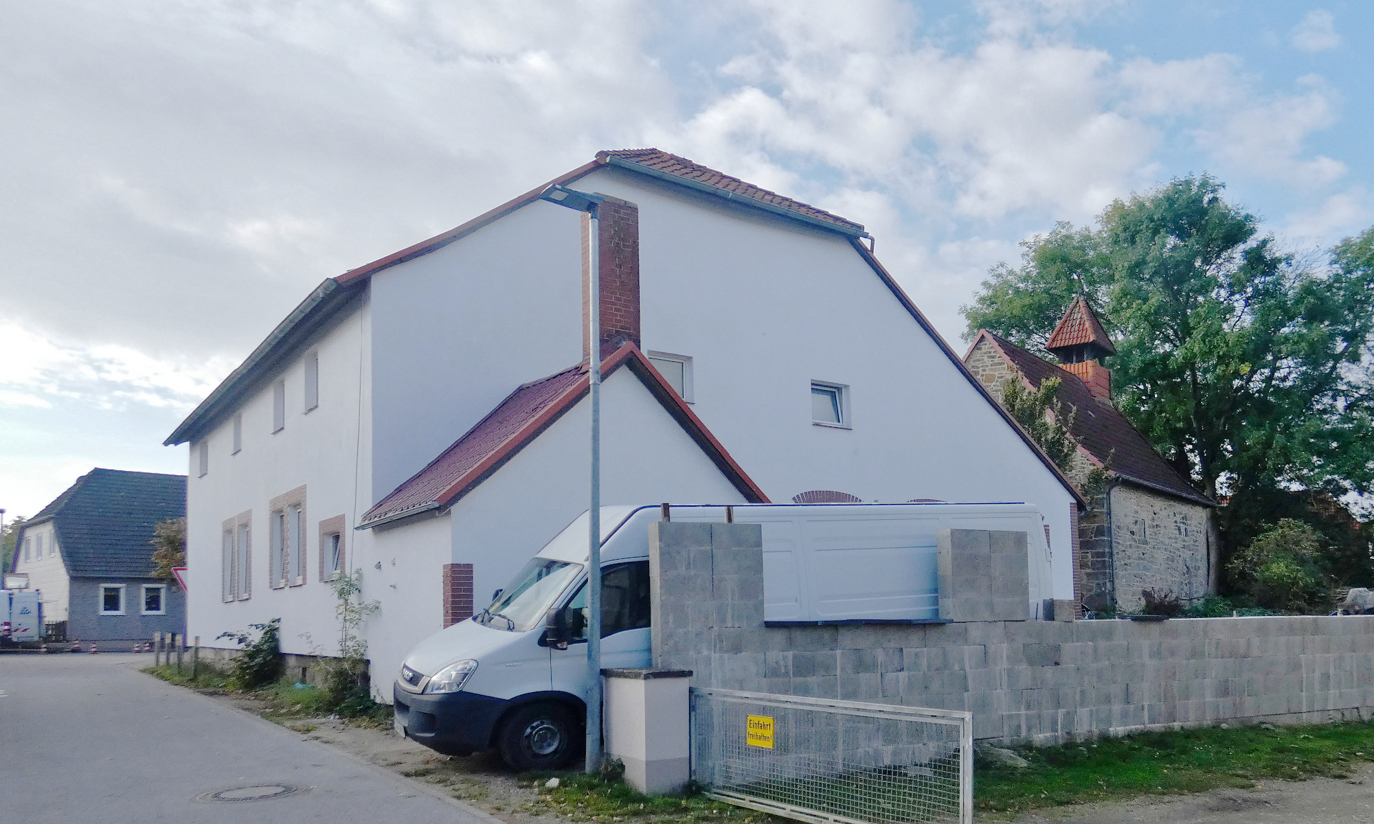 Das Schulhaus wurde ab 1825 für die Dörfer Linderte und Vörie errichtet und von 1912 bis 1919 umgebaut. 1966 wurde die Schule geschlossen. Das Gebäude diente danach als Verwaltungsnebenstelle und wurde 1986 verkauft und nach 2014 renoviert.